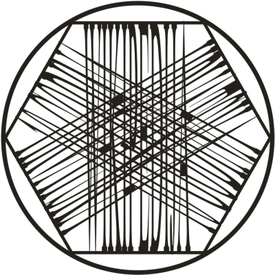 Pletenica - blizugletka, vrsta zagonetke(rješenje:wikipedija-hrvatska-10 godina)